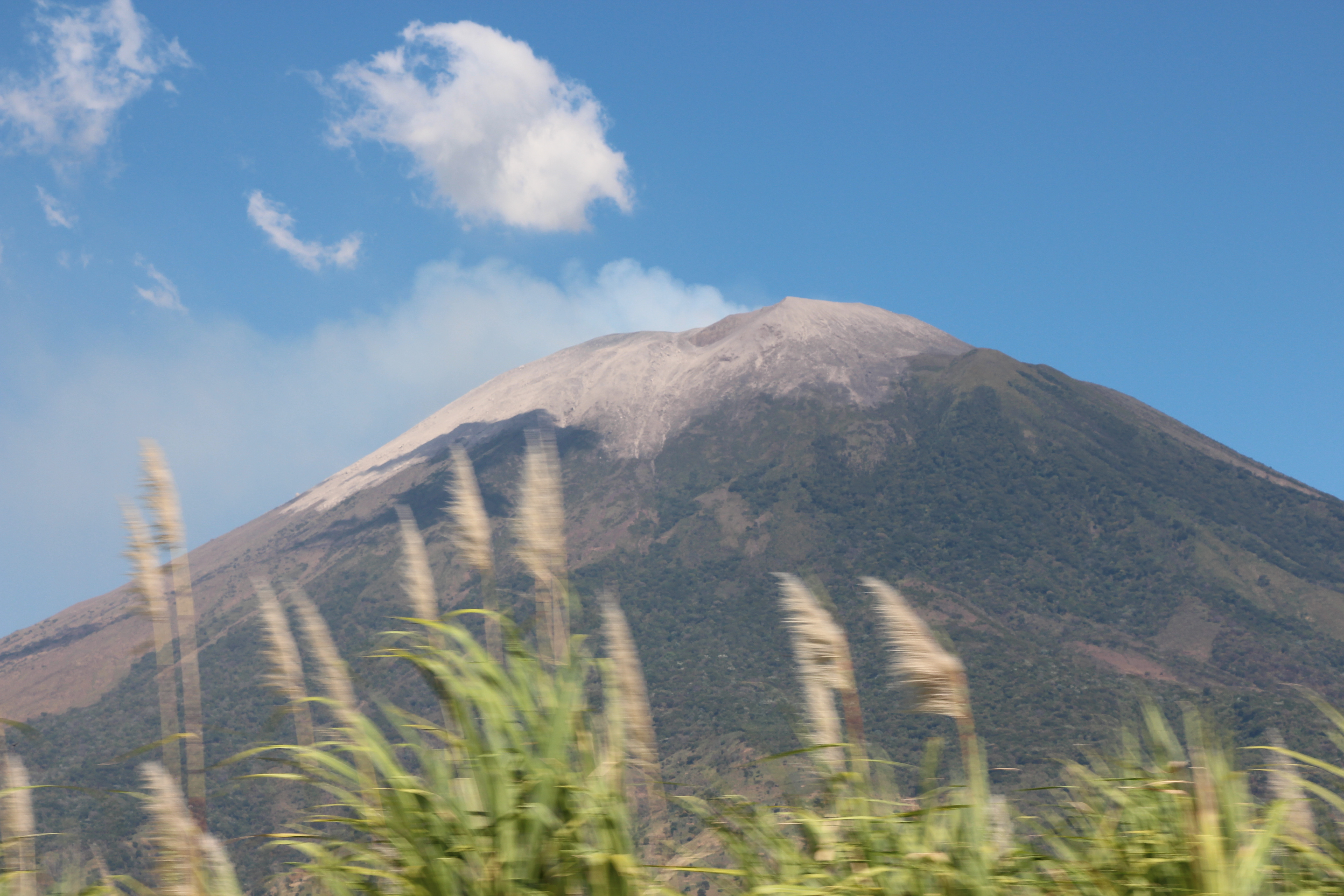 Nächster Tag